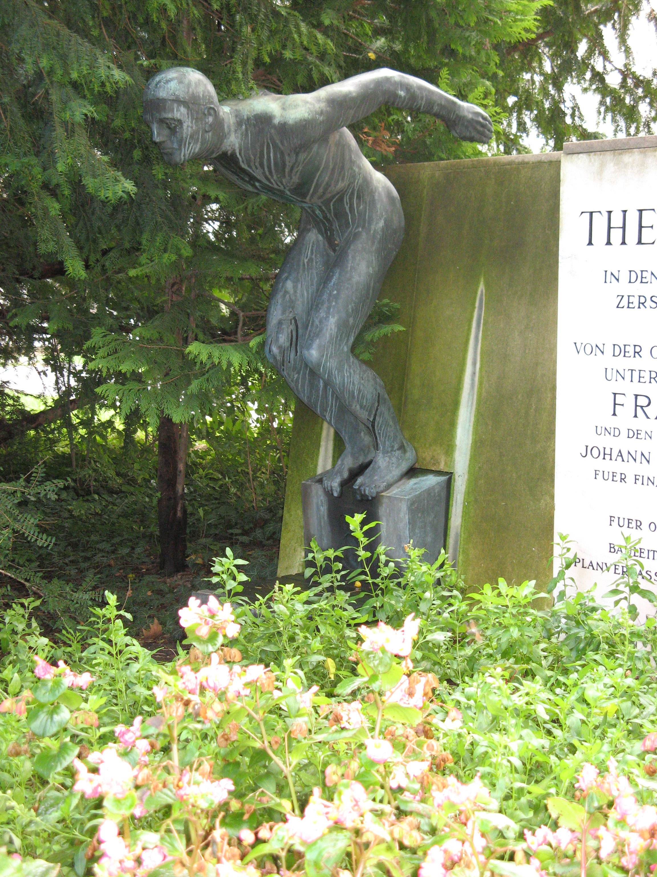 Oskar Thiede: Schwimmer, 1955, Bronzefigur vor dem Theresienbad in Wien-Meidling